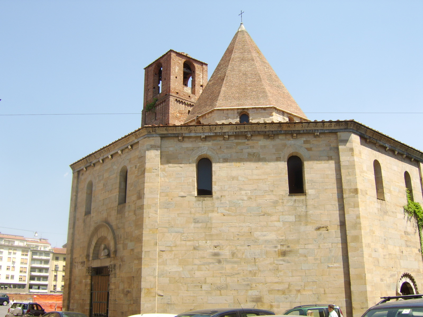 Pise,église du Saint-Sépulcre (XIIe.s).